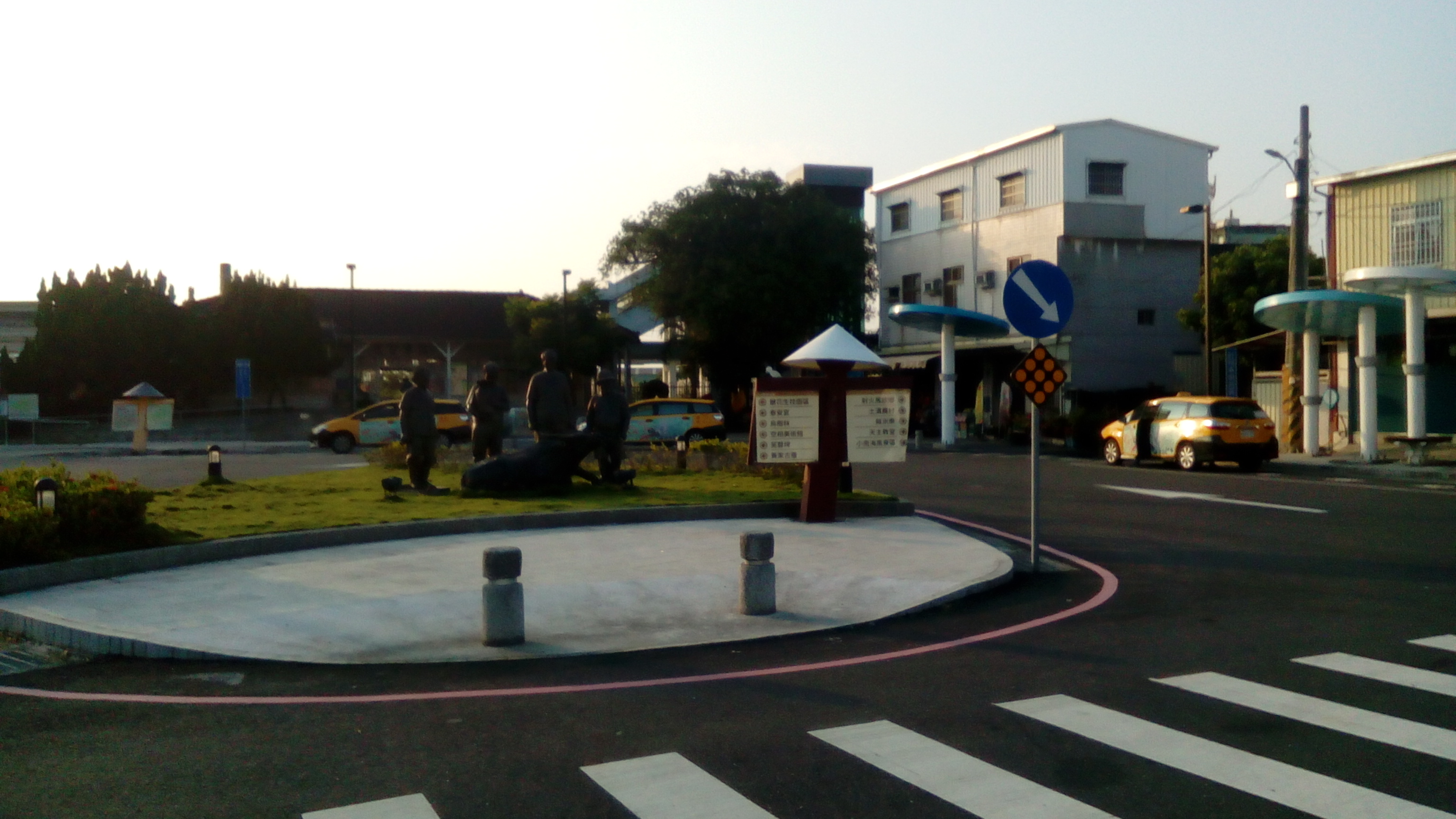 同上